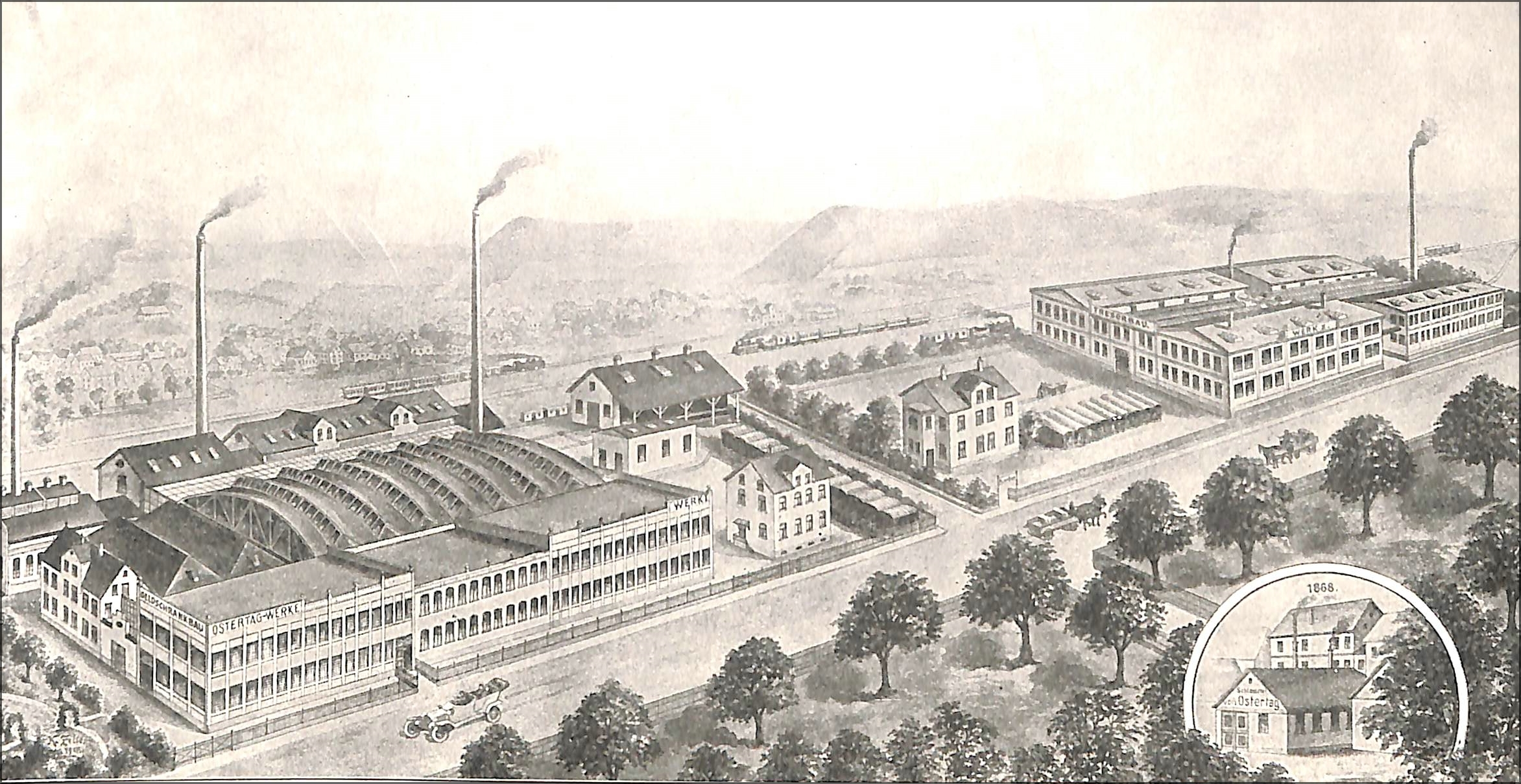 Aalen - (fiktive) Ansicht der Ostertag-Werke, Hersteller von Tresoren und Geldschränken.